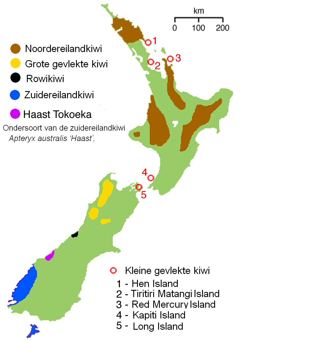 map showing distribution of kiwi (with Dutch text), marron: Apteryx mantelli (Noordereilandkiwi) yellow: Apteryx haastii (grote gevlekte kiwi) black: Apteryx rowi (Rowikiwi) blue: Apteryx australis (Zuidereilandkiwi) violet: Apteryx australis 'Haast' or Apteryx haastii (Haast Tokoeka)